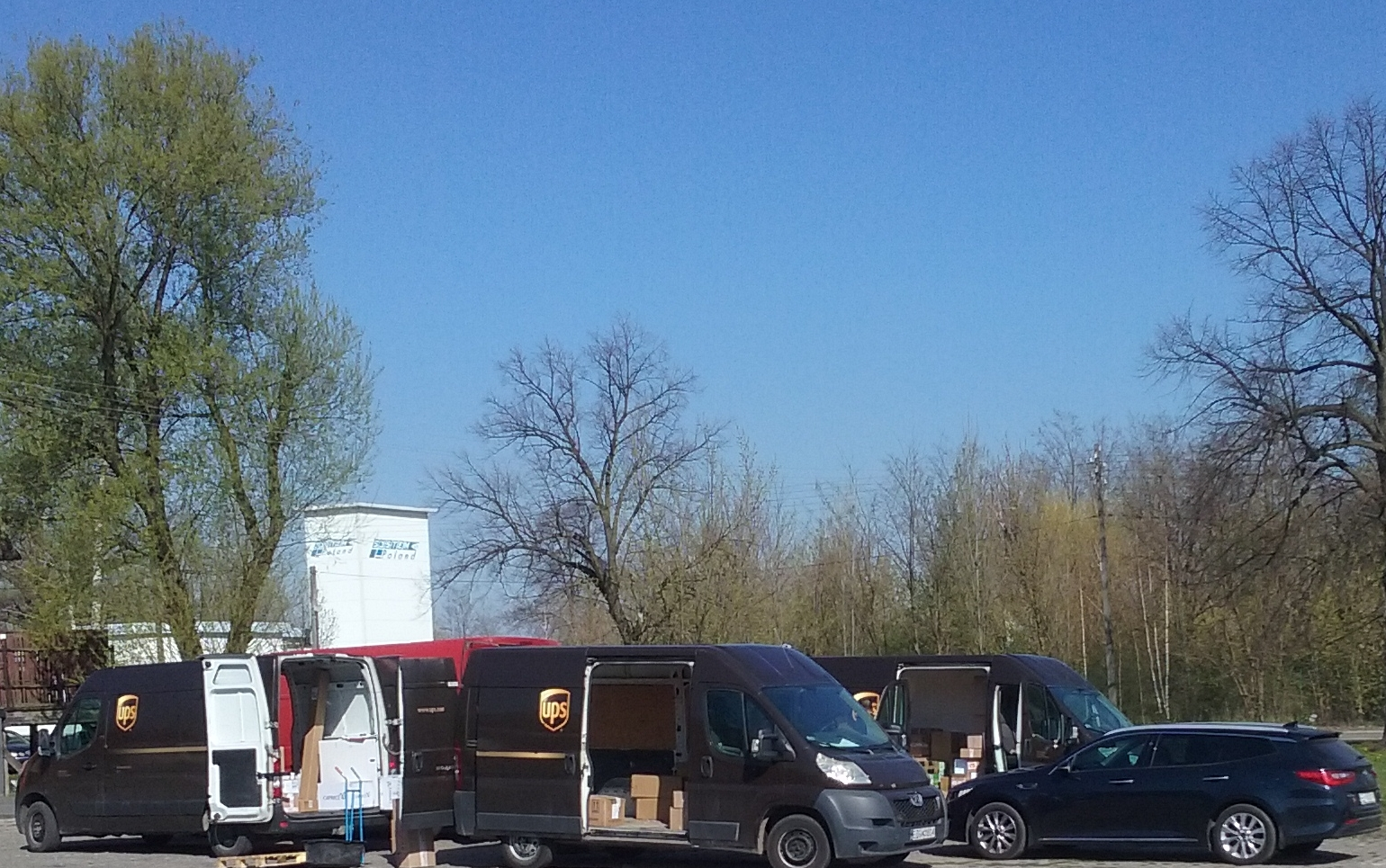 Tomaszów Mazowiecki w województwie łódzkim, PL, EU. Poranny przeładunek regionalnych wozów UPS w Tomaszowie. CC0